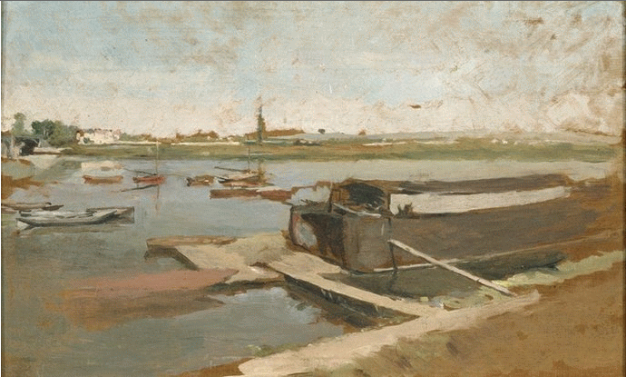 Depicted place: Les berges de la Seine vu de l'amont de l'ancien pont de Poissy à Poissy.